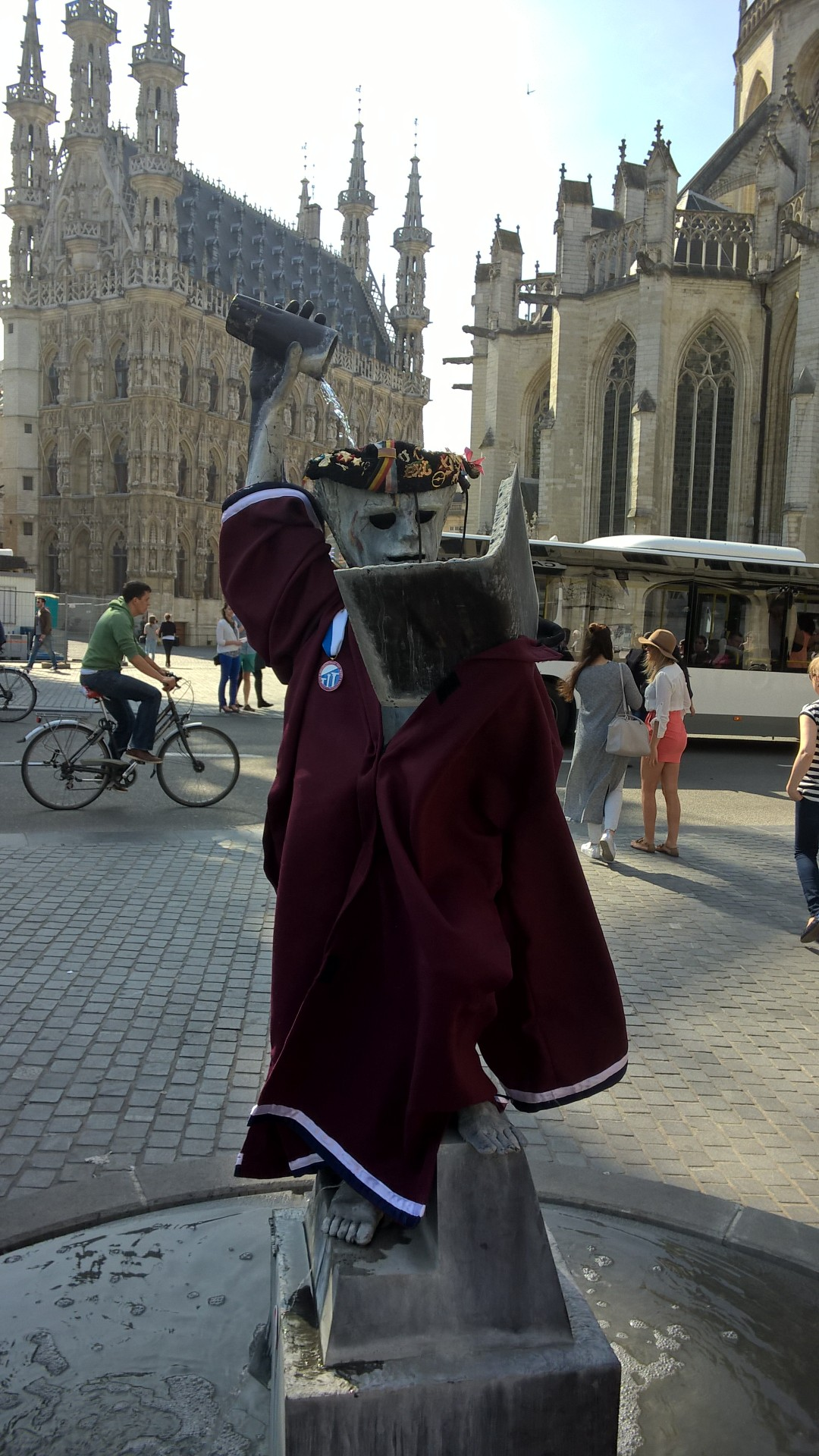 West-Vlams: Fonske dragen een toga van de ANLO (Academicus Neo Lovaniensis Ordo, Louvain-la-Neuve) en student hoofddeksels van de UCL